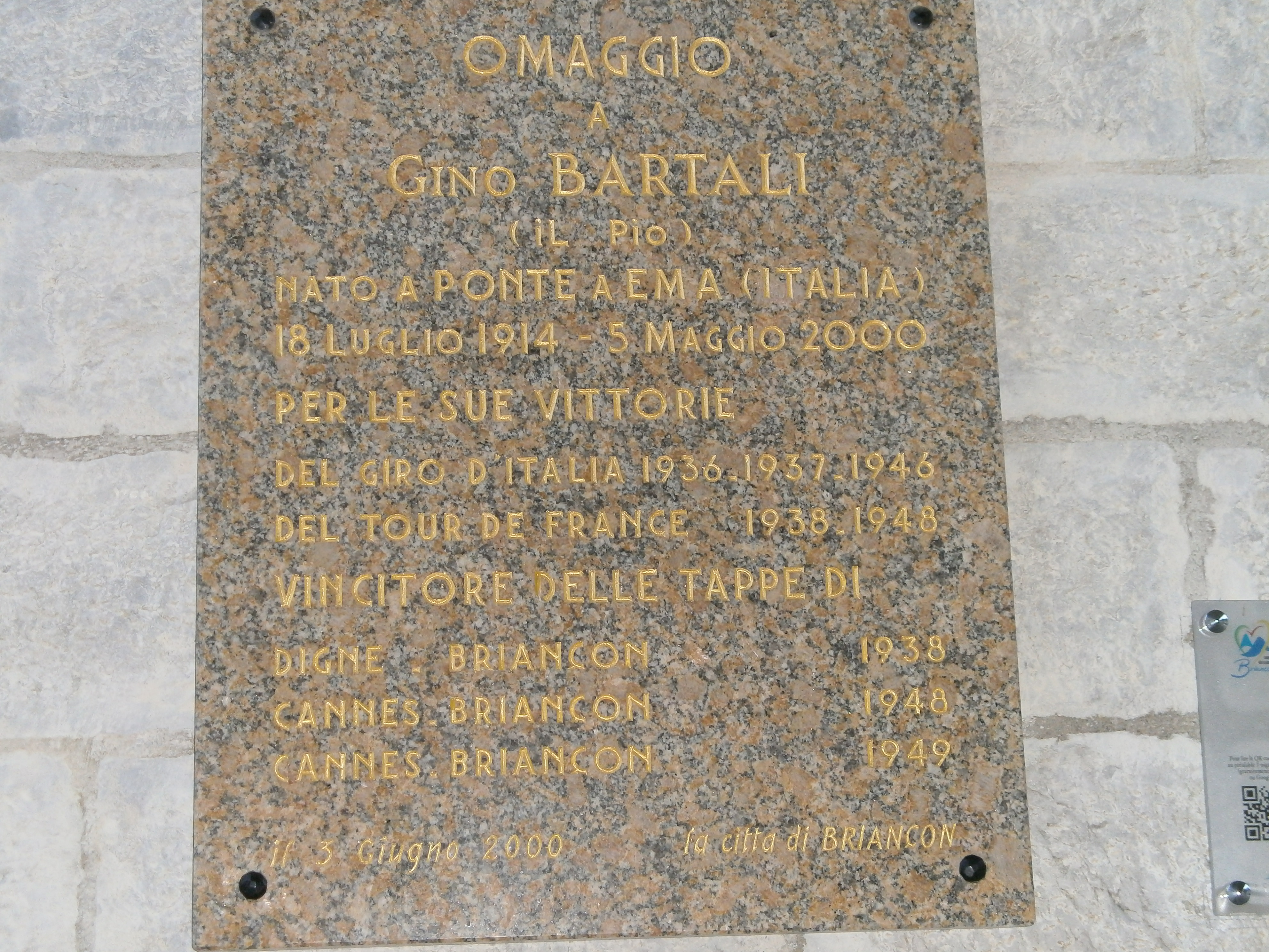 בשנת - 2000 הונח לוח הוקרה לברטלי, המפרט את הישגיו, בשער הכניסה לעיר העתיקה מוקפת החומה בריאנסון בצרפת, שהייתה נקודת הסיום של הקטע הקשה ביותר בטור של 1948.